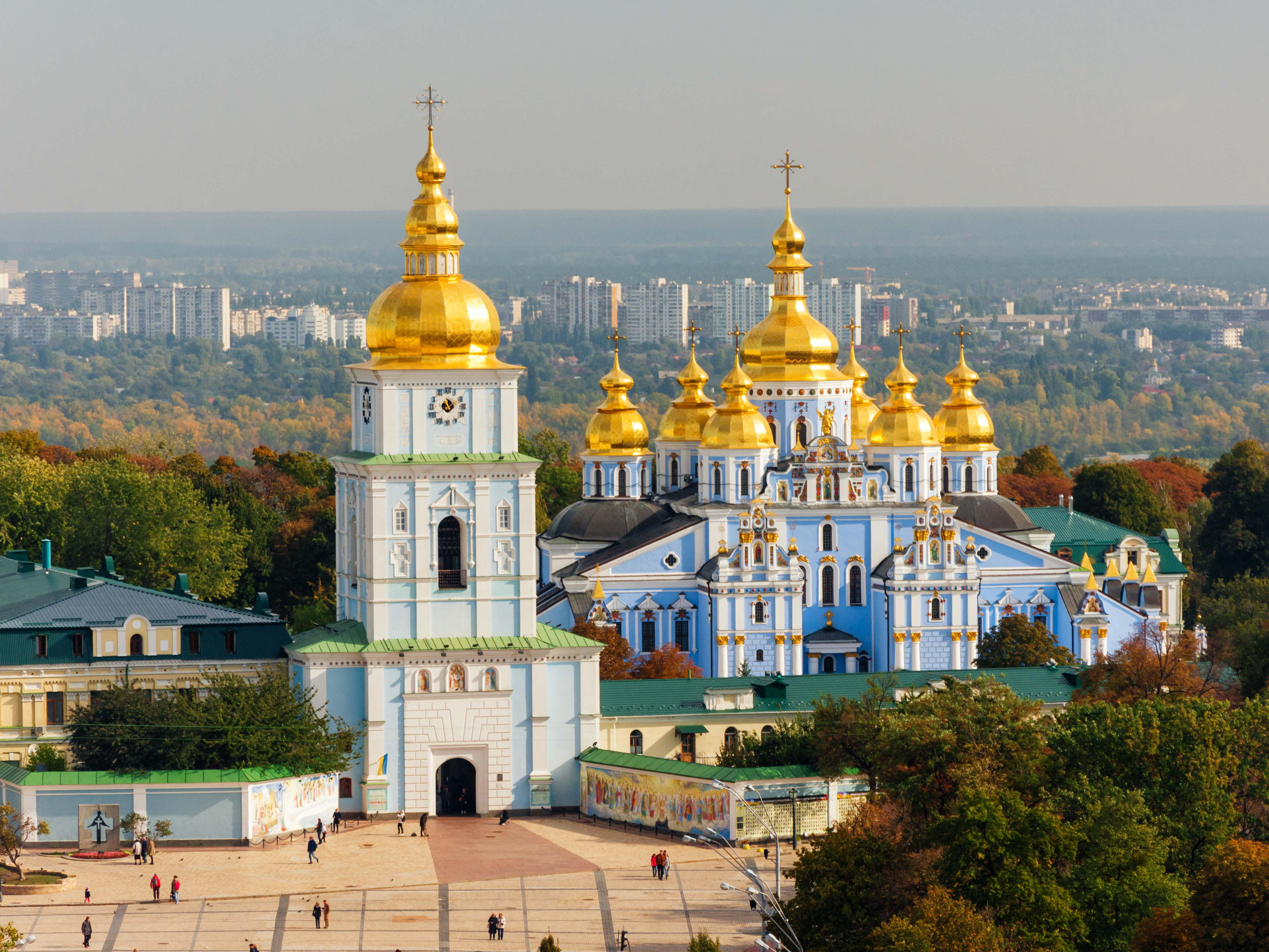 Комплекс споруд Михайлівського Золотоверхого монастиря, Київ, вул. Трьохсвятительська, 4–8